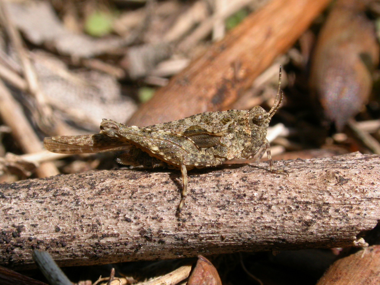 Tetrix ceperoi